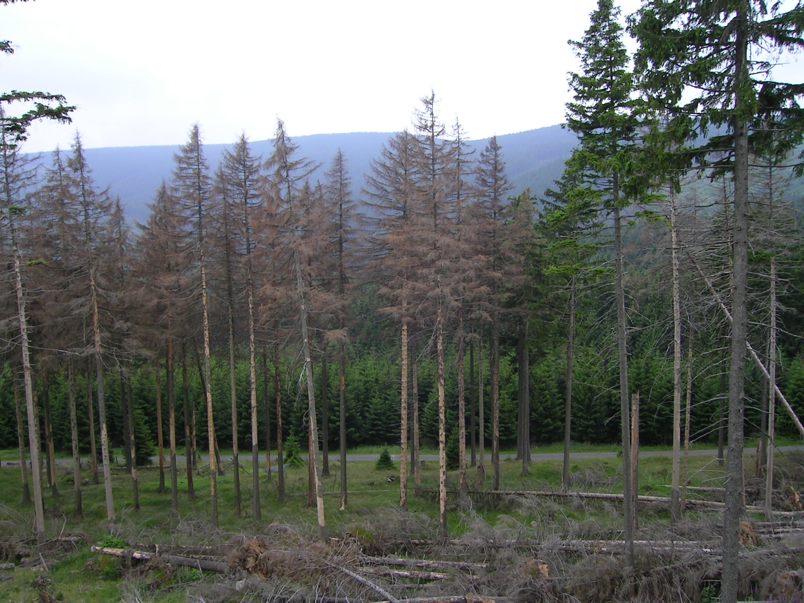 Totholz und Borkenkäferbäume im Nationalpark Harz.